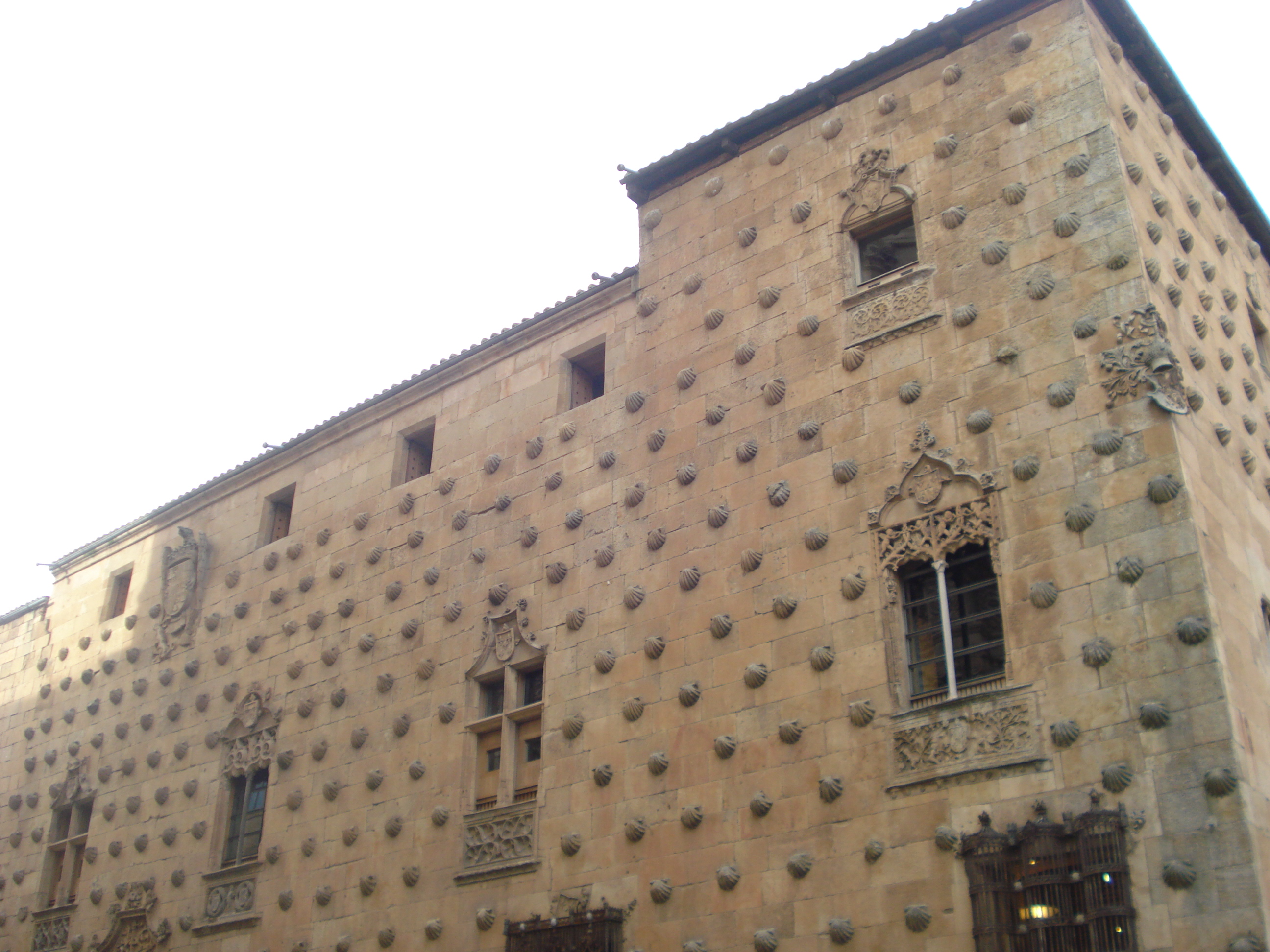 House of the shells (Salamanca)